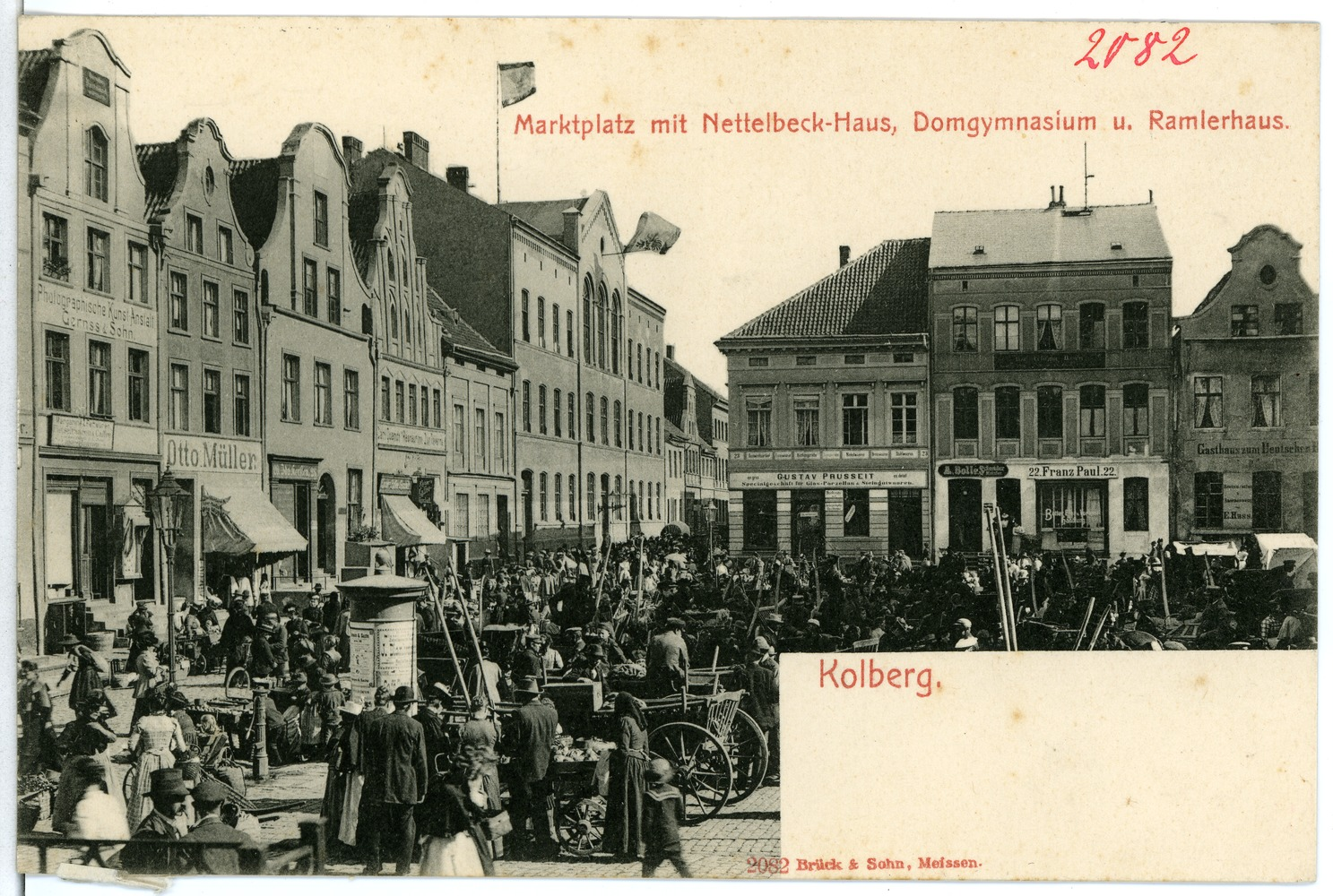 Kolberg; Markt This postcard is from publisher Brück & Sohn in Meißen ( postcard has a unique number 02082 and is available in a higher resolution at the publisher. This images was uploaded in a cooperation project between Wikipedians and the publisher.